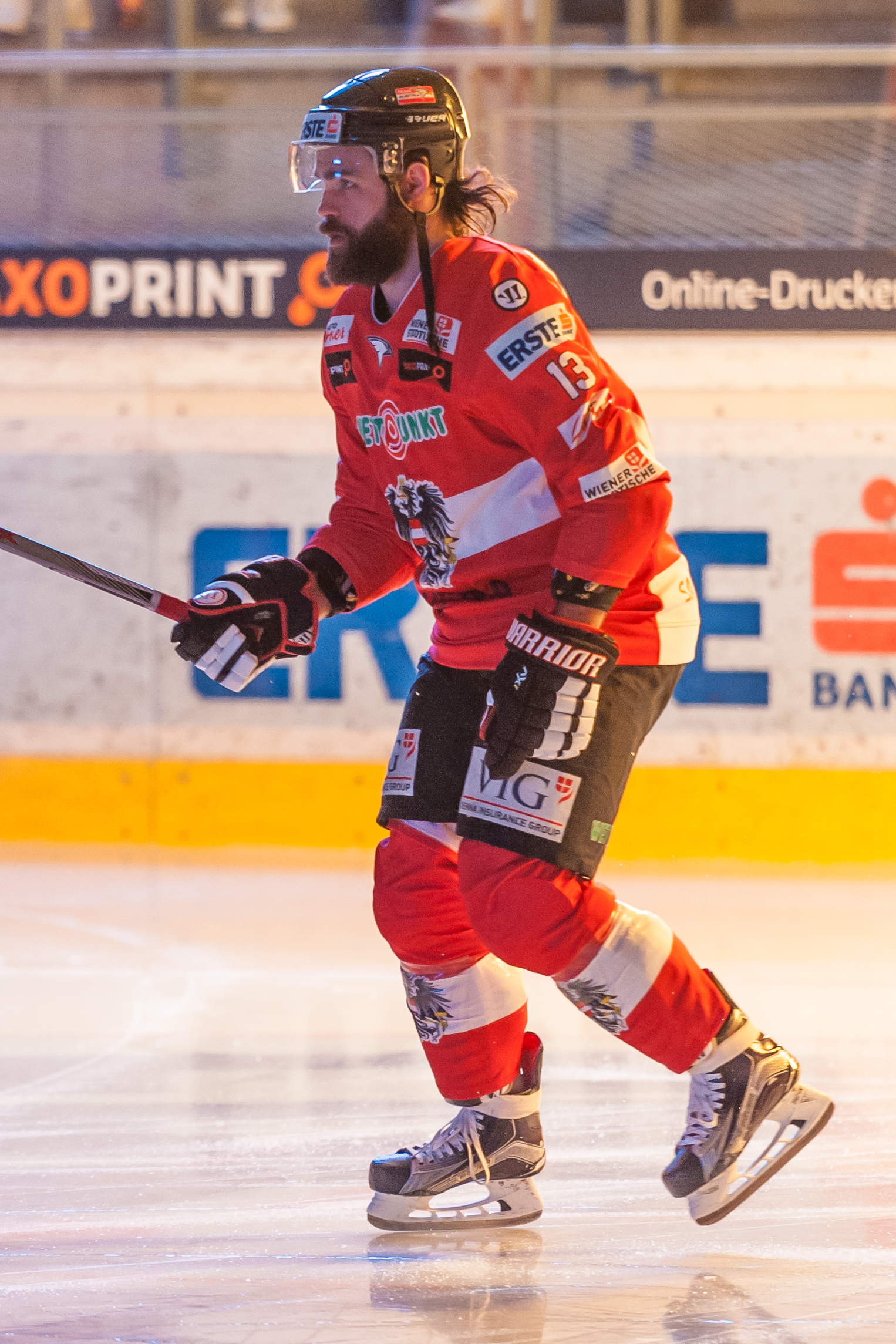 Freundschaftliches Eishockey-Länderspiel - Österreich vs Italien. Bild zeigt Michael Schiechl (AUT).